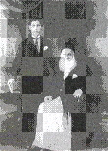 הרב מרדכי אקאלר ונכדו דויד